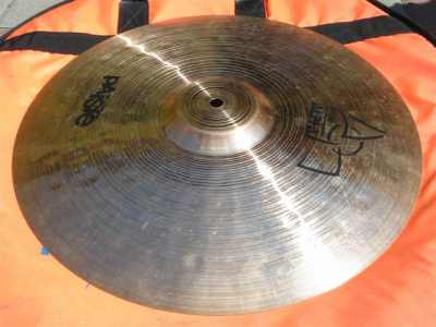 Paiste Alpha (starsza wersja) 16" Crystal crash